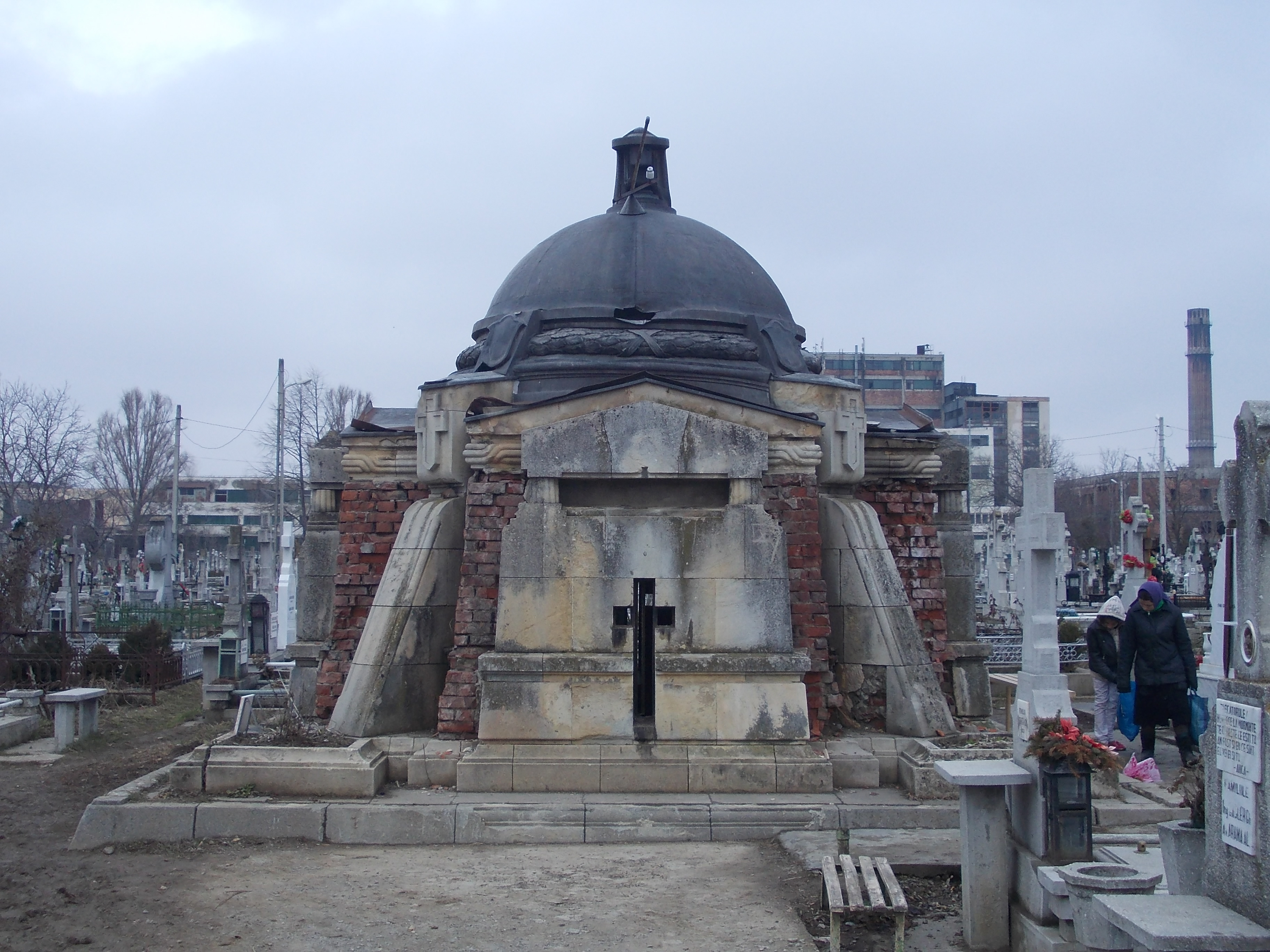 Cimitirul Eternitatea, Roman